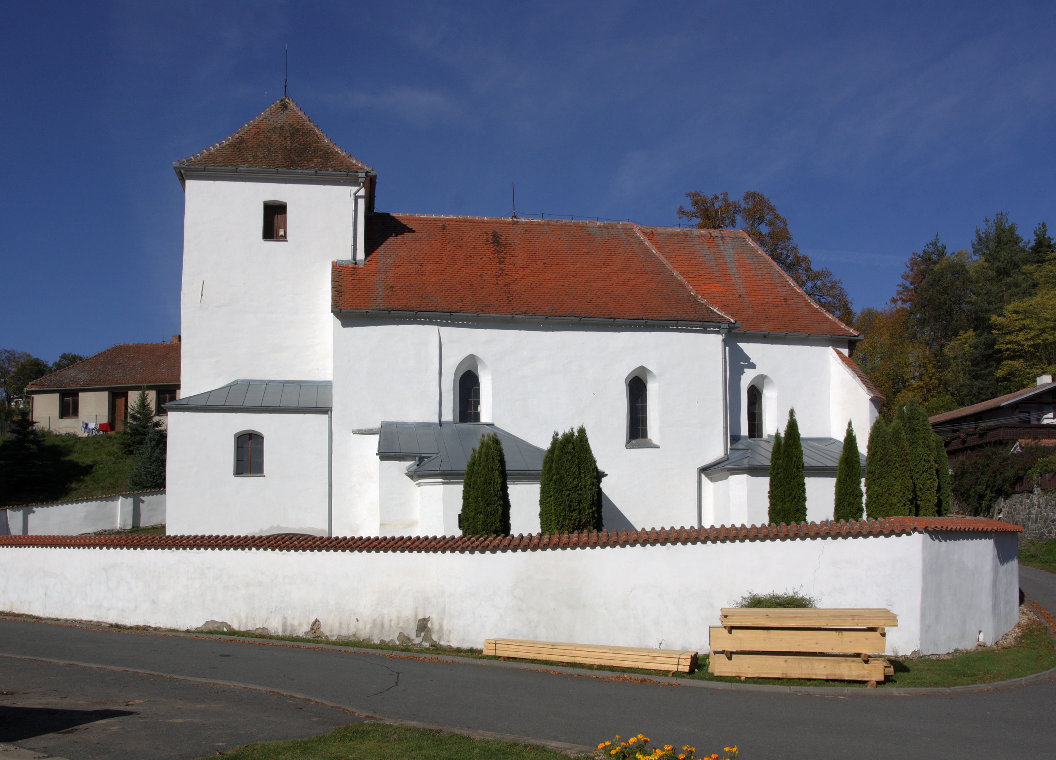 Žďárec - kostel svatého Petra a Pavla, pohled od jihu